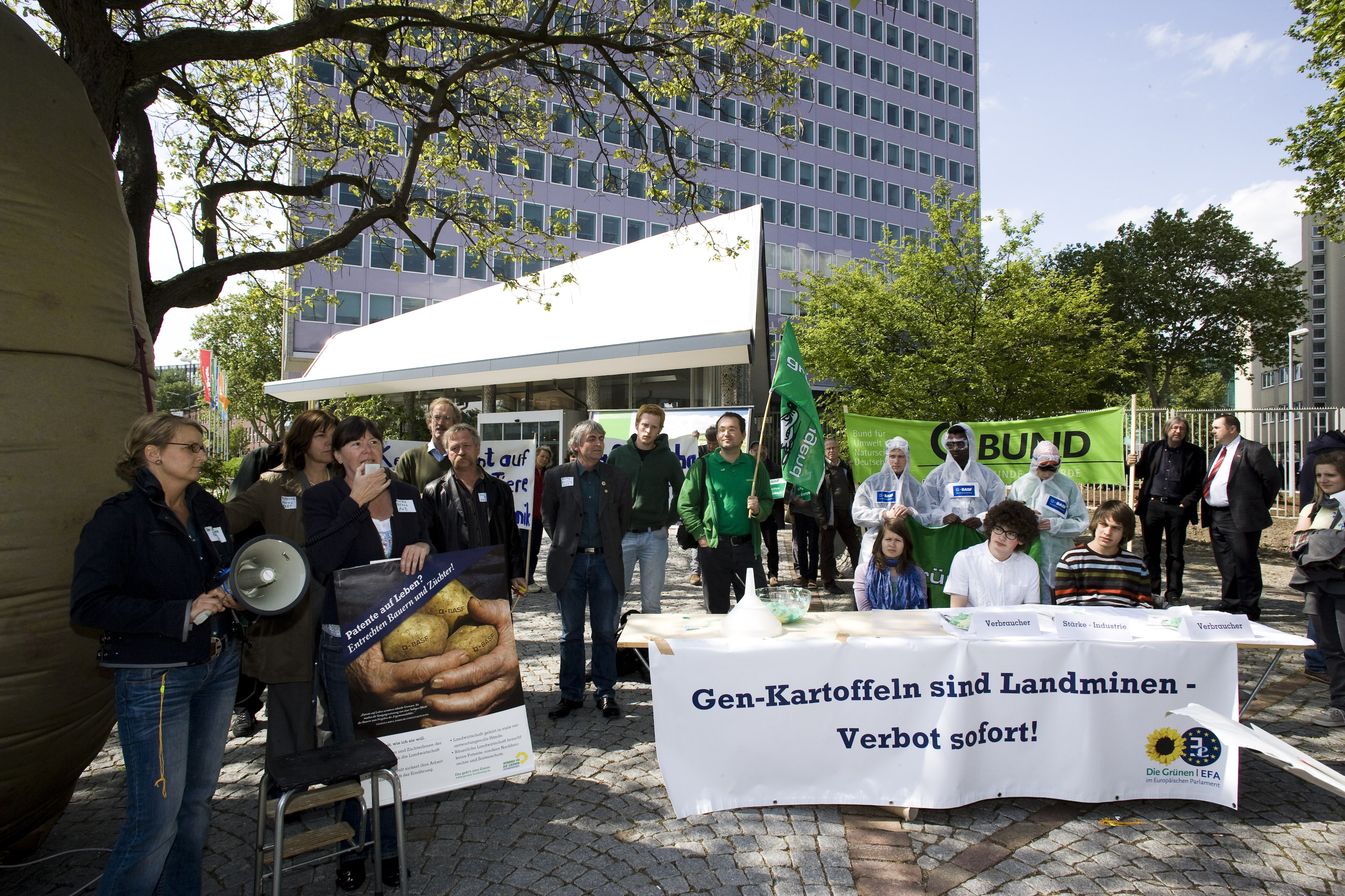 Mit einem Aktionstheater und der Übergabe einer Protesturkunde demonstrierten Bündnis 90/Die Grünen sowie verschiedene Naturschutz- und Bauernverbände Mitte Mai gegen Amflora vor dem BASF-Hauptsitz in Ludwigshafen.